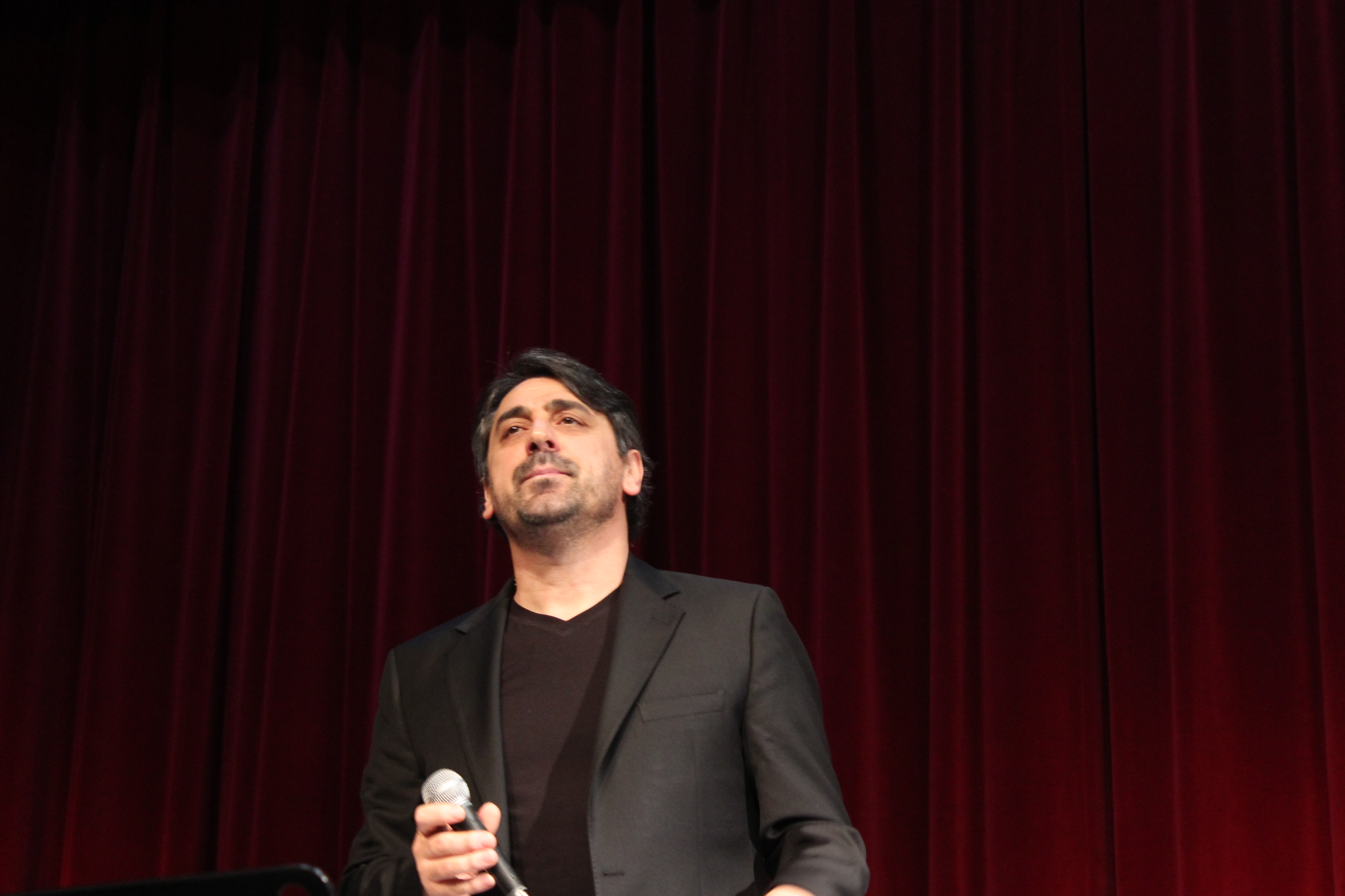 Altunizade Kültür ve Sanat Merkezi Konserinde